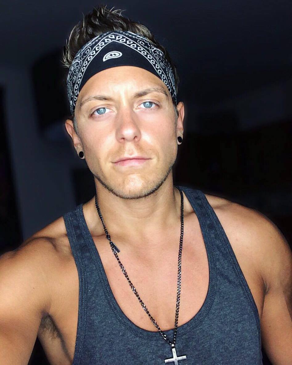 Portrait ("Selfie") von Danny Liedtke.